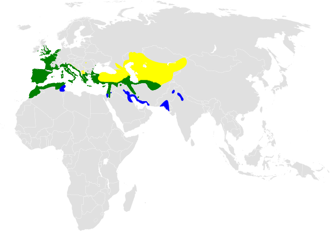 Cettia cetti distribution map, based on